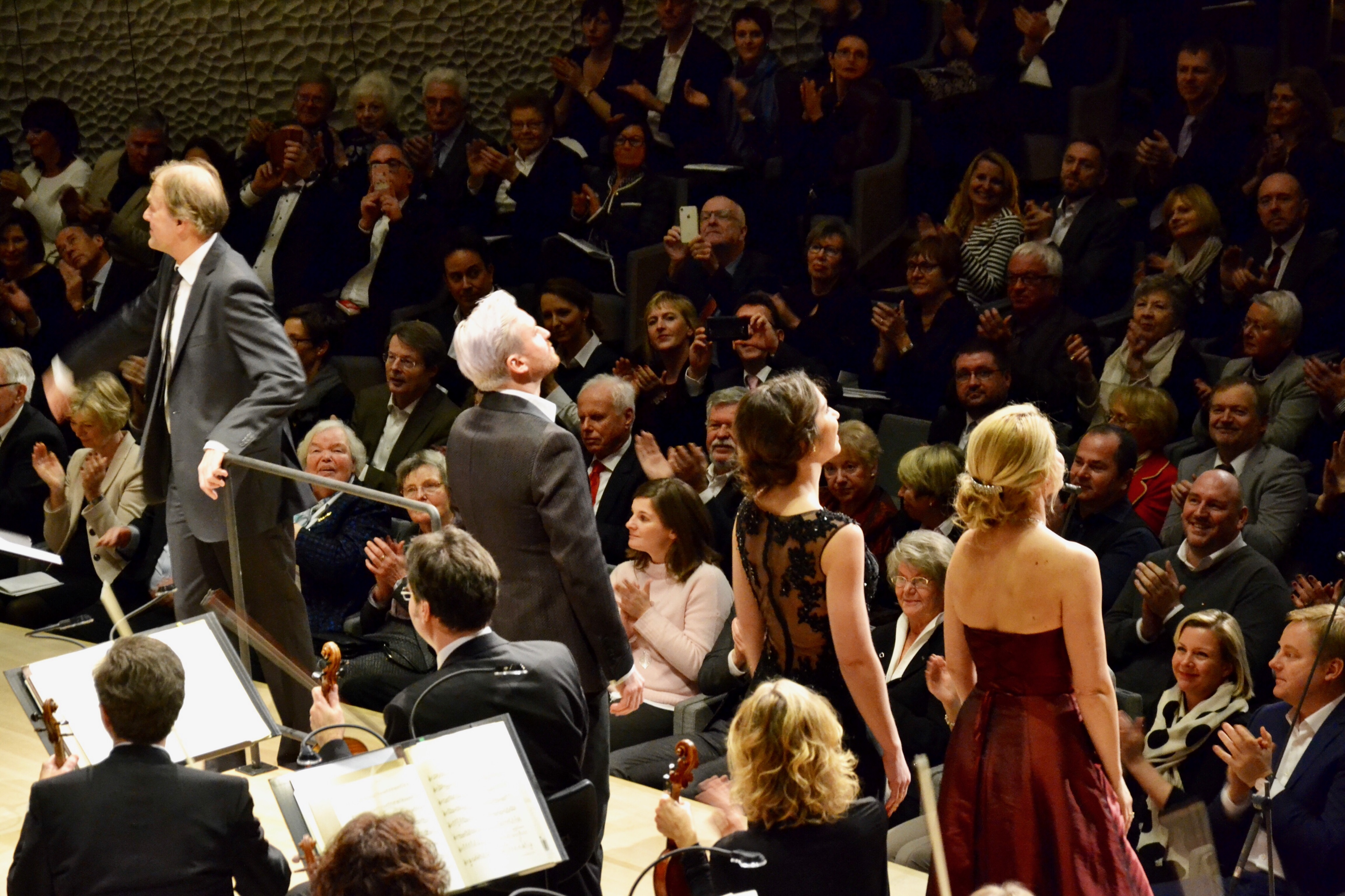 Eröffnungsfestival der Elbphilharmonie; 15. Januar 2017; Dirigent: Thomas Hengelbrock; Sänger: Maria Bengtsson, Hanna-Elisabeth Müller, Alex Potter, Pavol Breslik